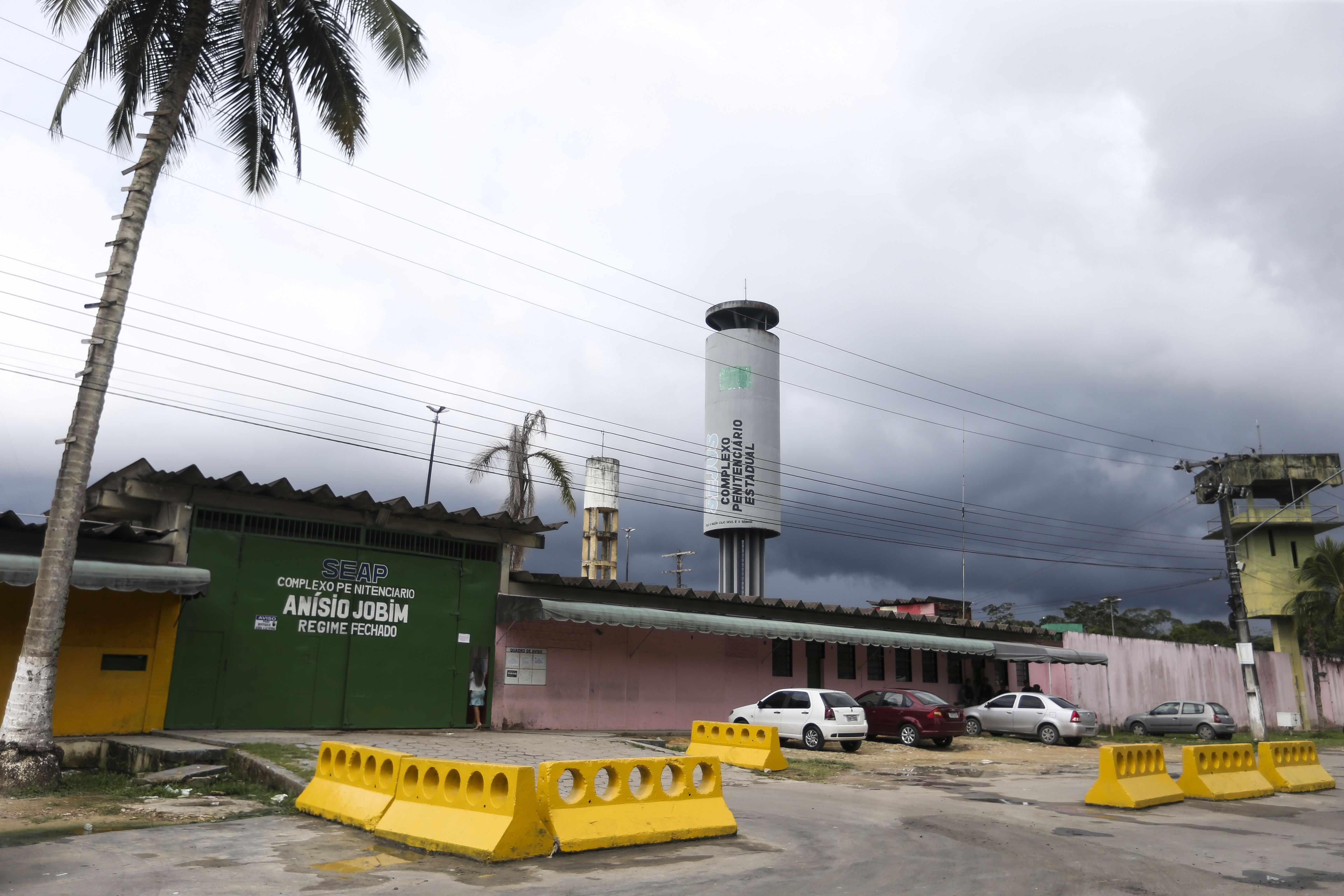 Portão principal do Complexo Penitenciário Anísio Jobim (Compaj). Foto: Marcelo Camargo/Agência Brasil